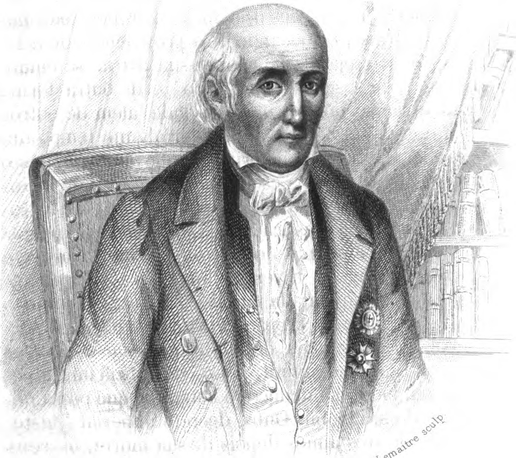 José da Silva Lisboa, Visconde de Cayrú.